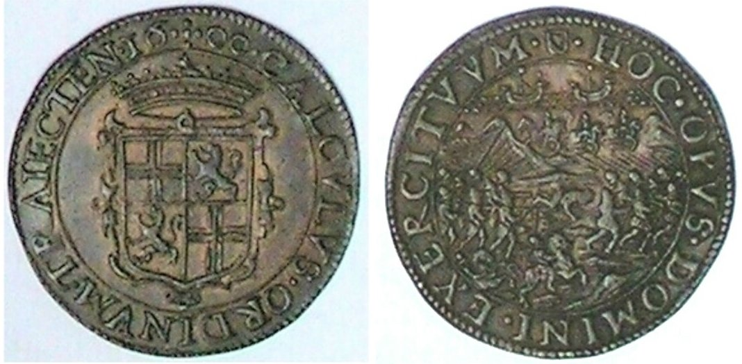 Rekenpenning Utrecht 1600, op het winnen van de slag bij Nieuwpoort. Foto van eigen exemplaar.